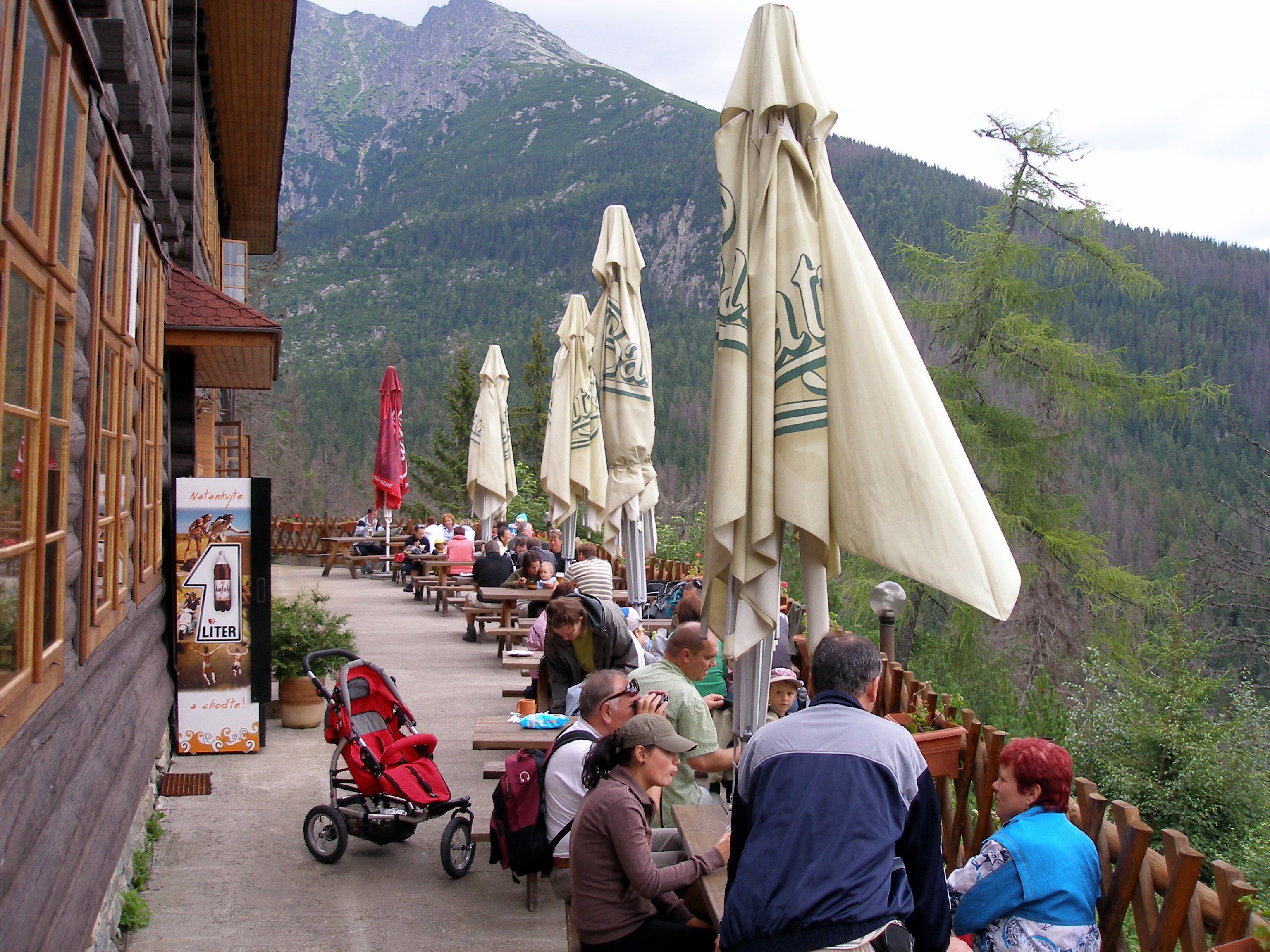 Bilíkova chata- horská chata pod Hrebienkom. Vysoké Tatry.